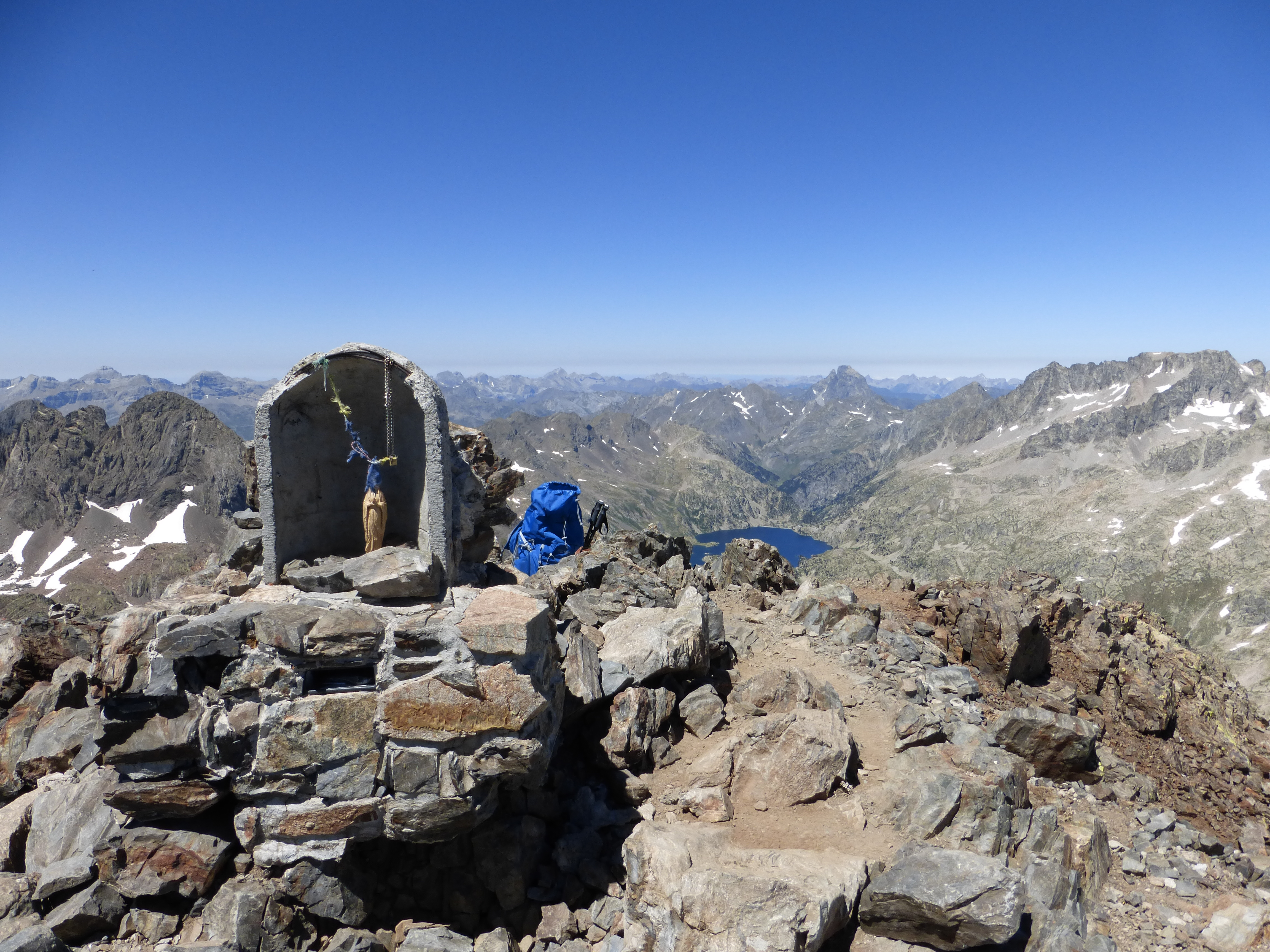 Statuette de la vierge dans son coffrage au sommet de la Fache (3005m). En arrière plan, le lac de Respumoso devant le pic du Midi d'Ossau (2885m), et tout à fait à droite les pics de la Frondella (3069m), parés de neiges éternelles.